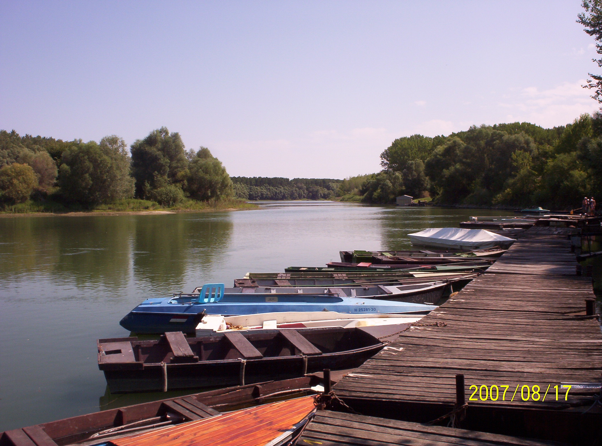 A Duna Ásványnál (Ásványráró, Győr-Moson-Sopron megye, Magyarország)